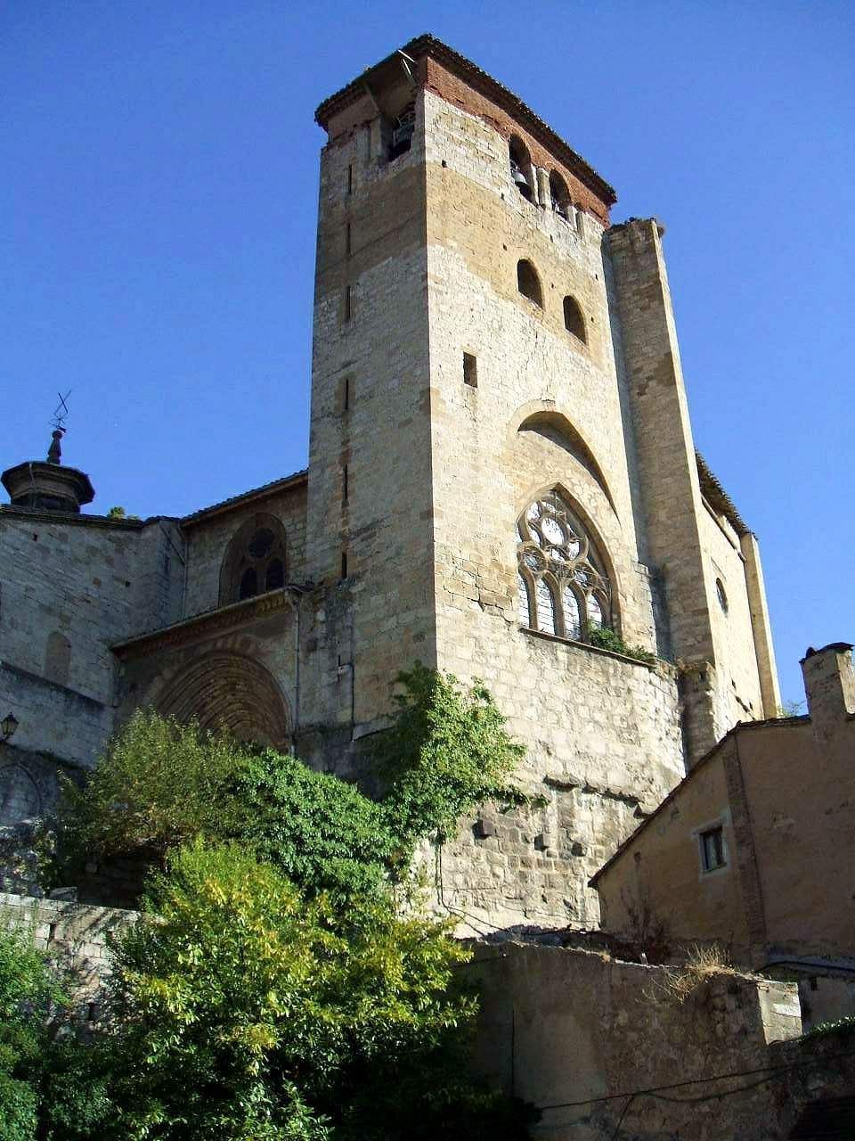 Iglesia de San Pedro de la Rúa, Estella (Navarra)